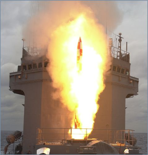 試験艦「あすか」での新アスロックの試射。